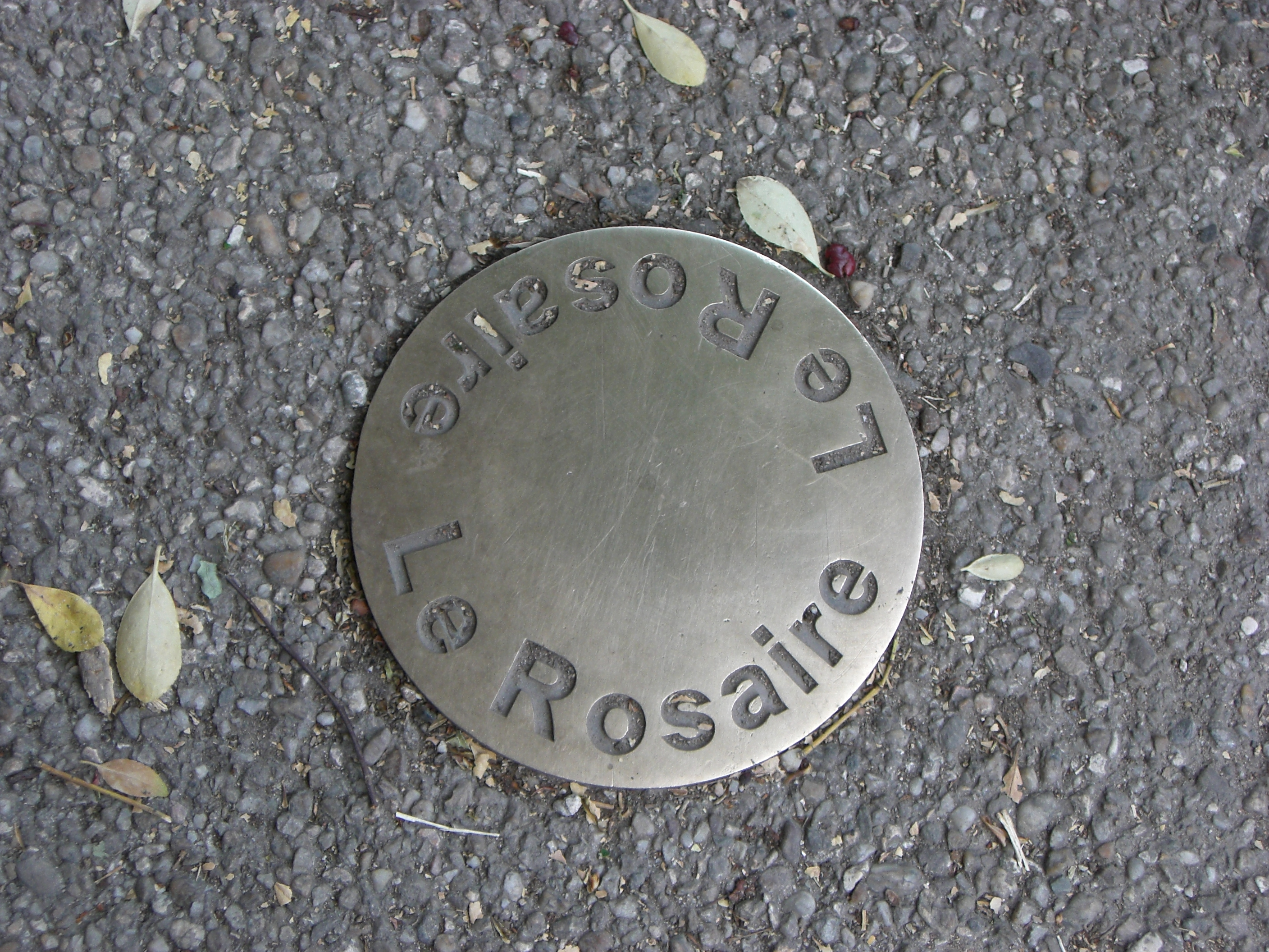 Lyon Jardin du Rosaire - signalétique au sol